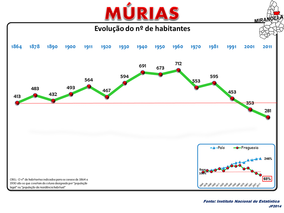 Evolução da População 1864 / 2011